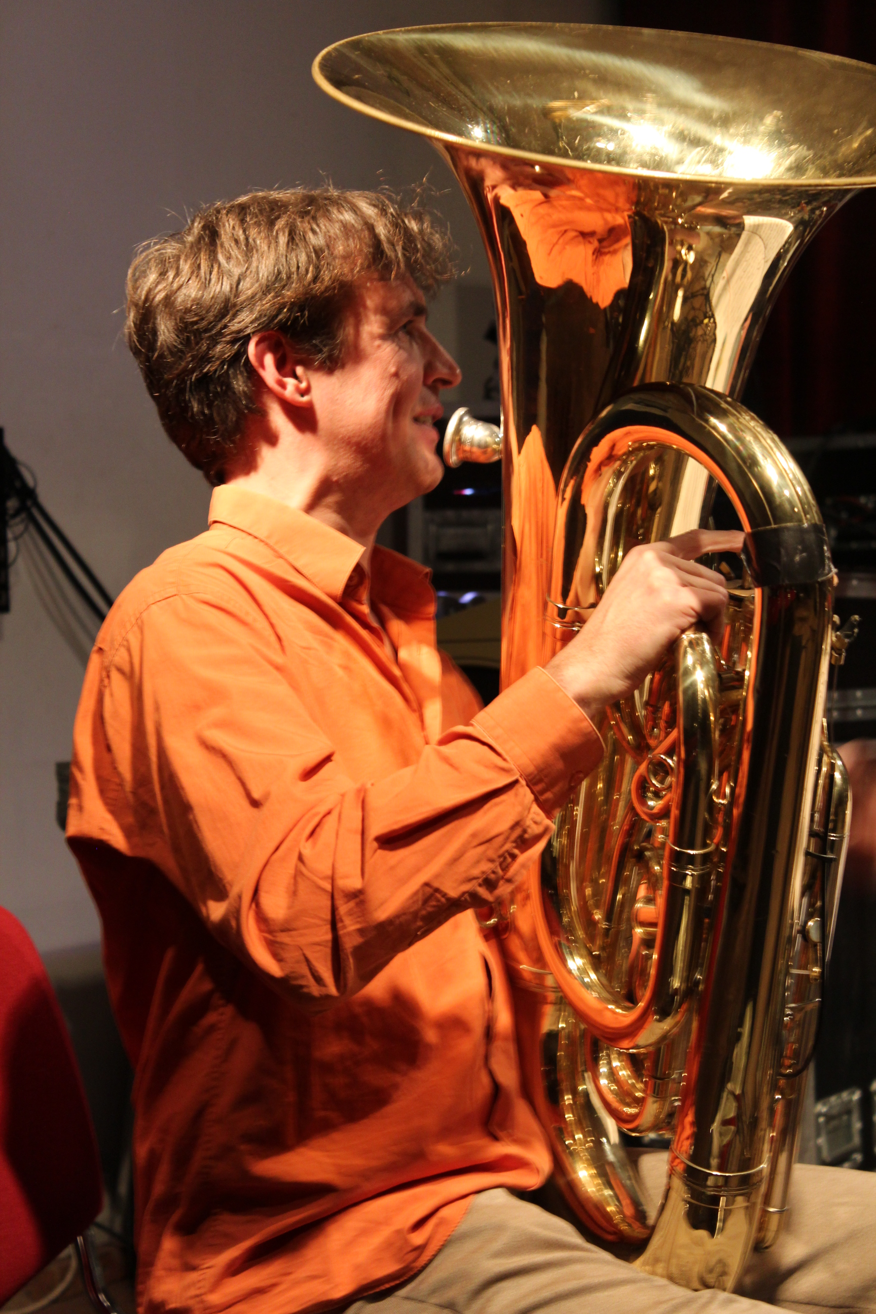 Carl Ludwig Hübsch auf dem SWR NEWJazz Meeting im Kölner Loft : „hübsch acht“, mit Carl Ludwig Hübsch - tuba, compositions, Isabelle Duthoit – clarinet, Joris Rühl – clarinet, Matthias Schubert – tenorsax, Wolter Wierbos – trombone, Philip Zoubek – piano, Joker Nies – electronics